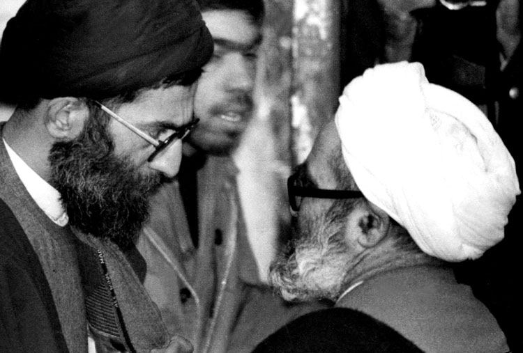 حسینعلی منتظری در کنار علی خامنه ای